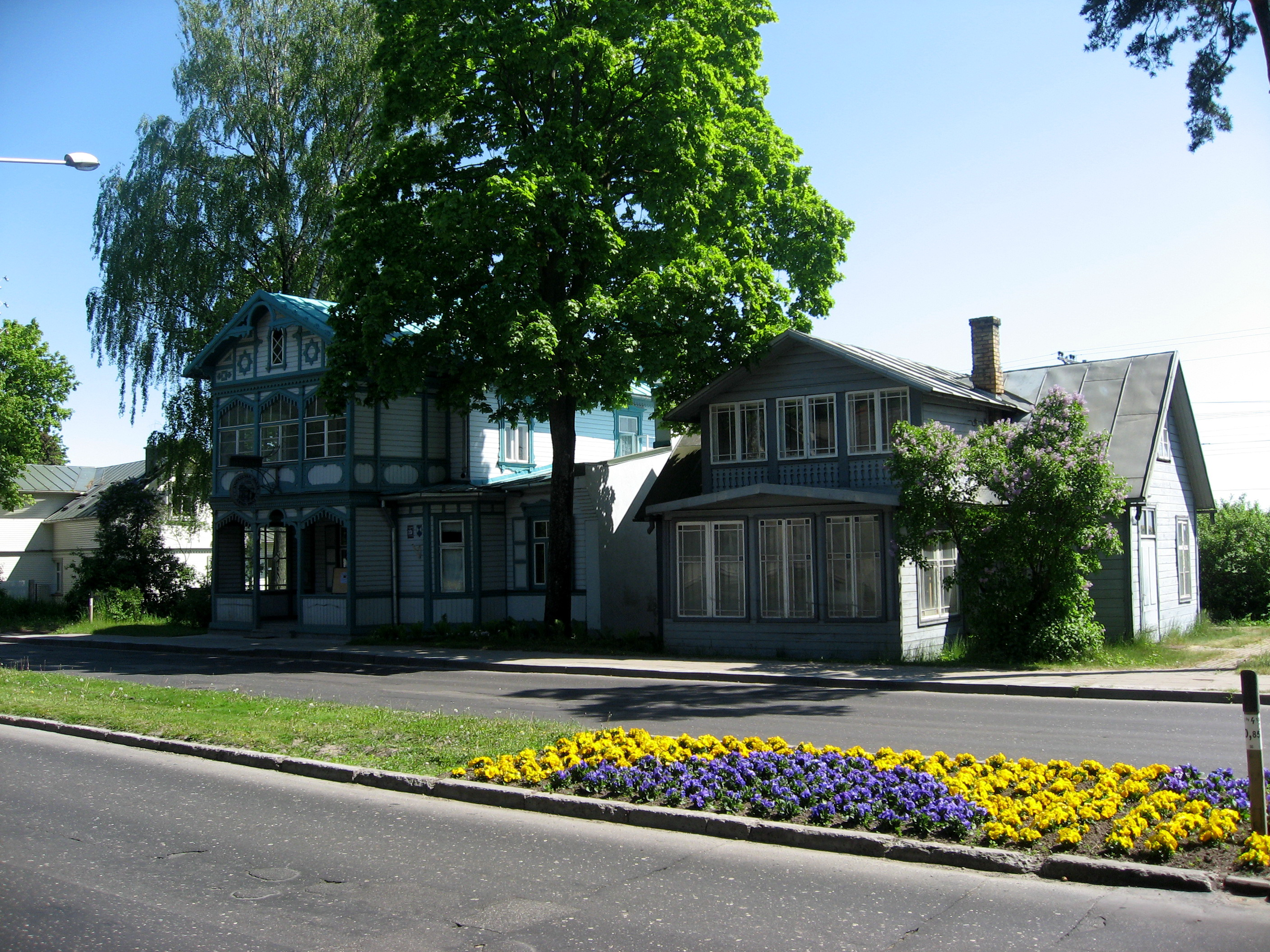 Jūrmala